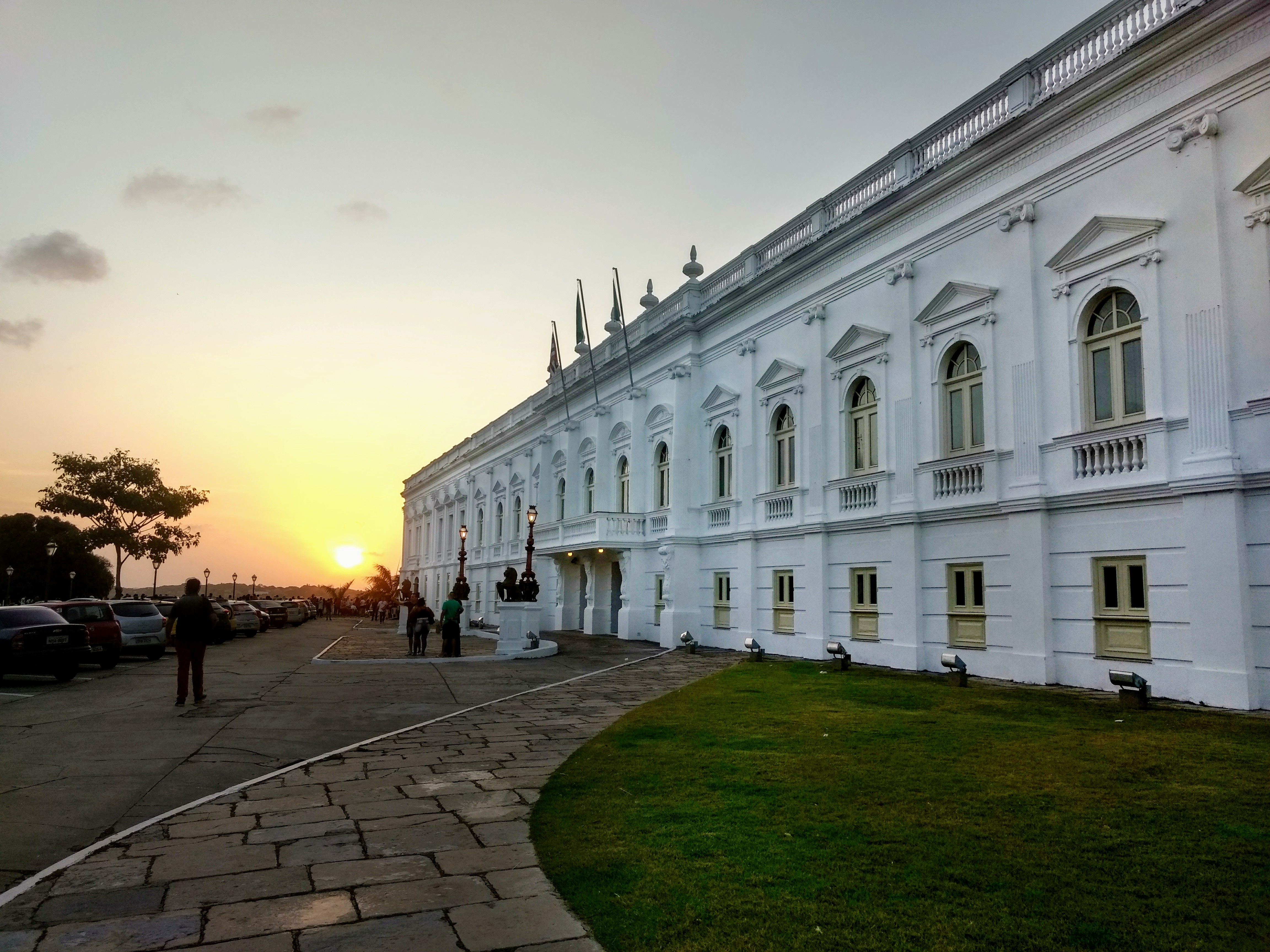 São Luís, MA: conjunto arquitetônico e paisagístico